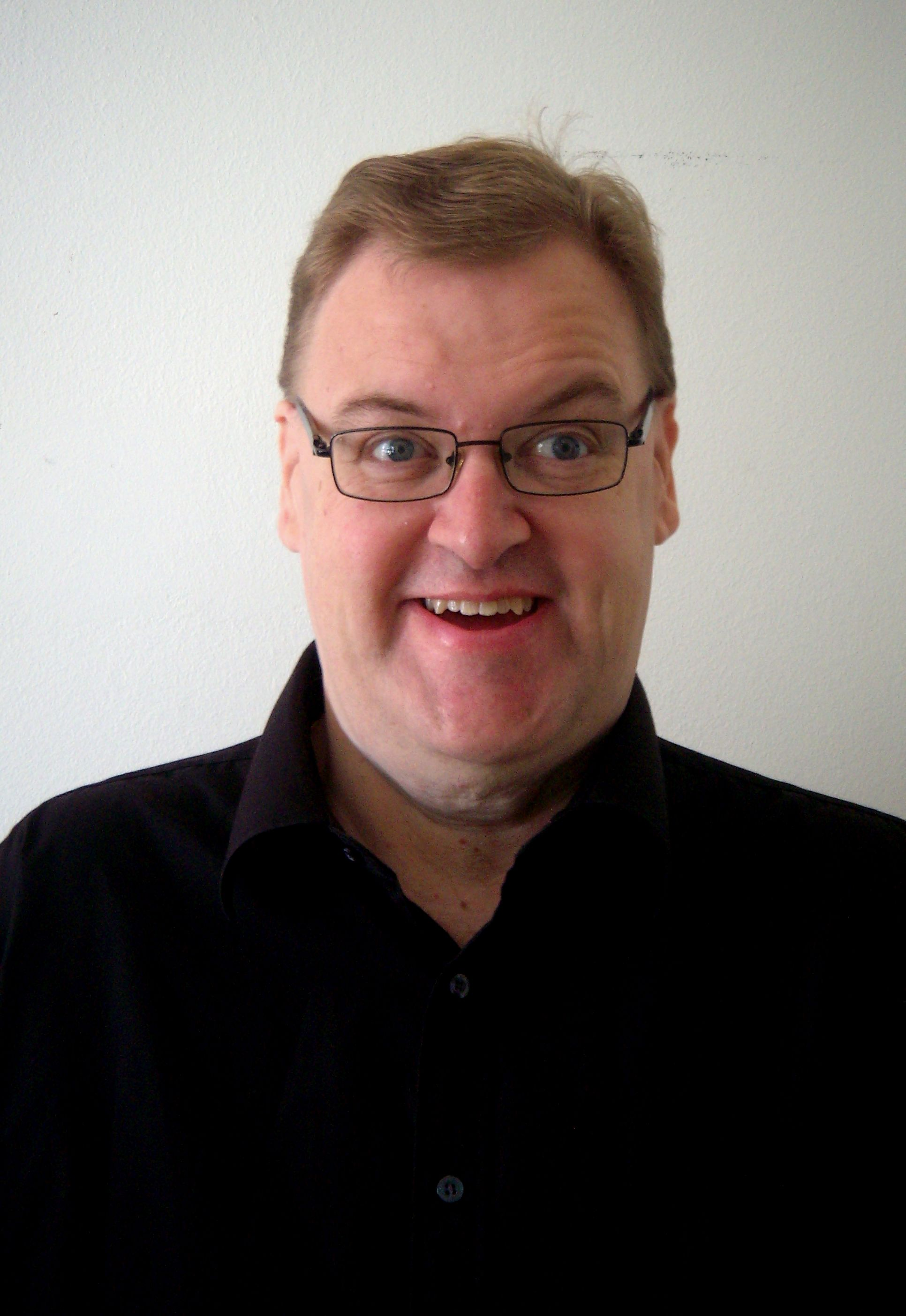 Michael Petersson